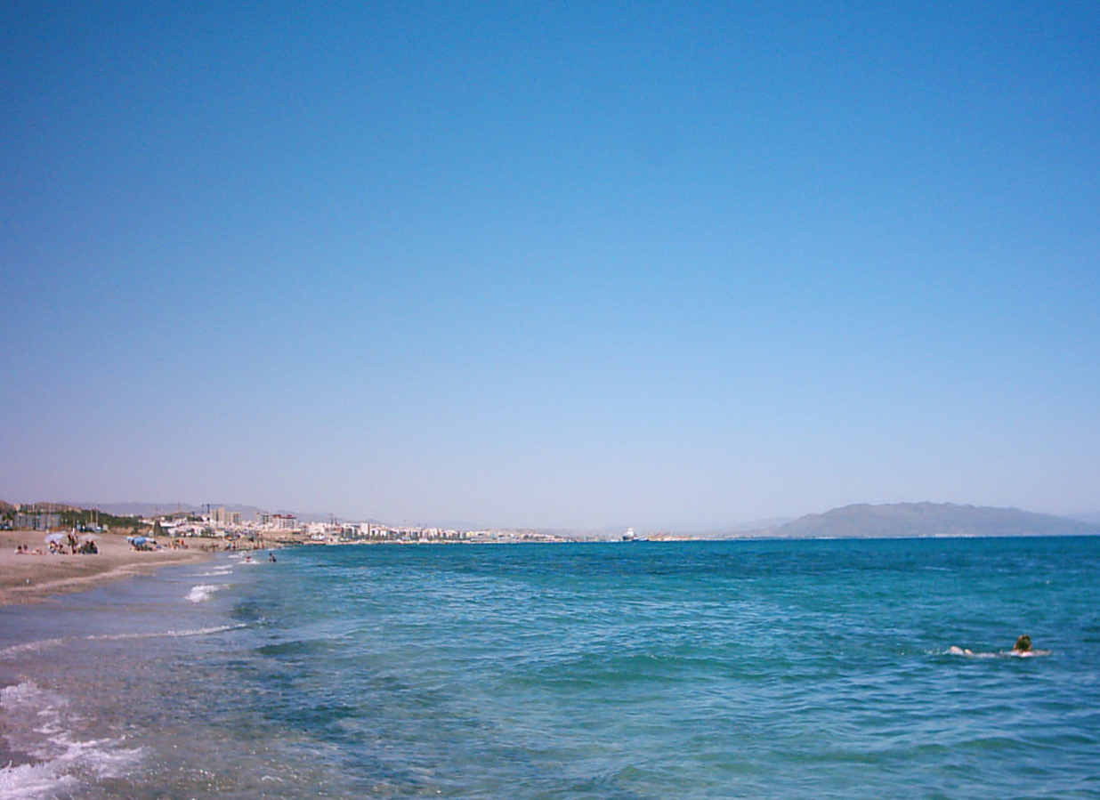 Playa en Mojácar (Almería, España)